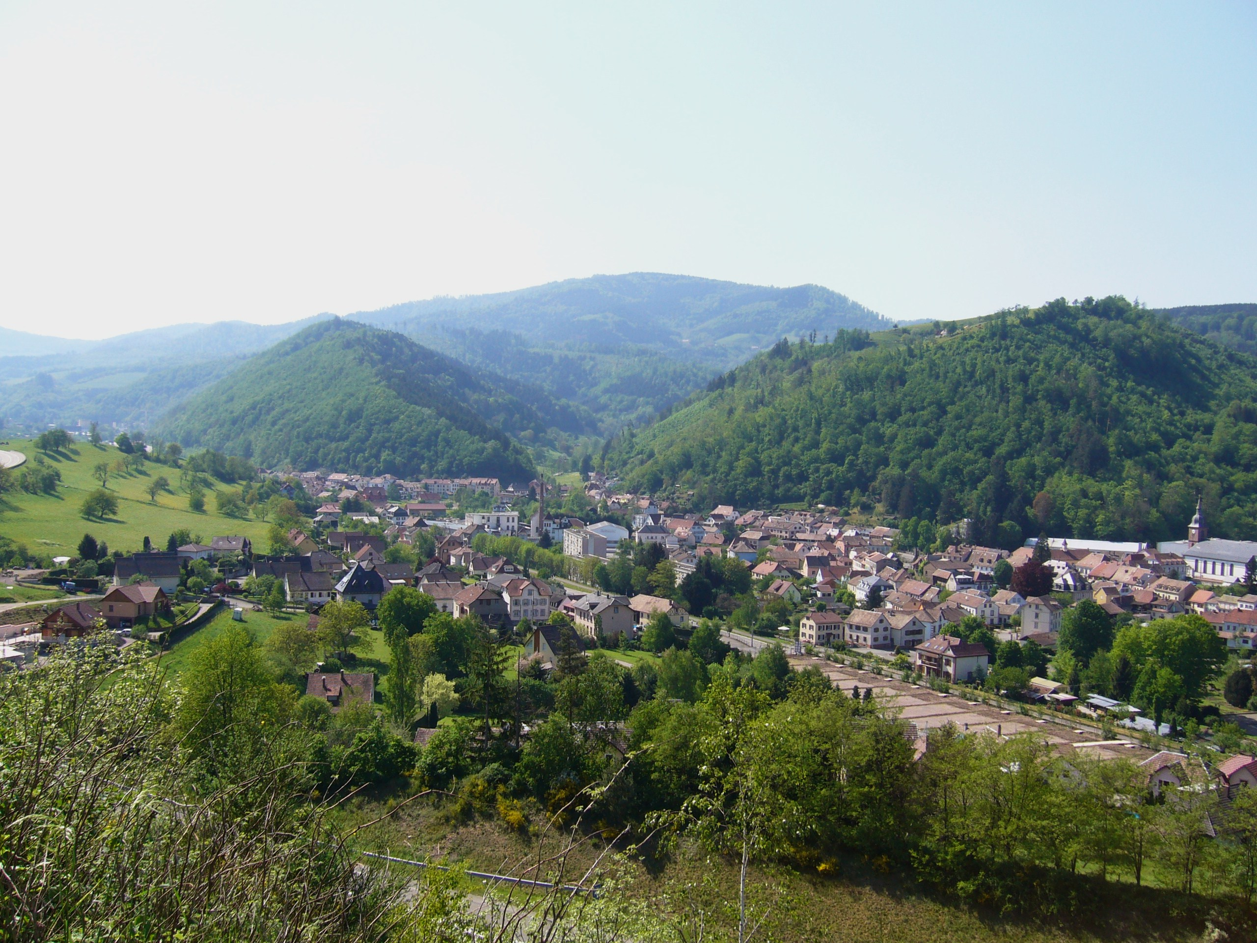 Sainte Croix-aux-Mines 105.JPG